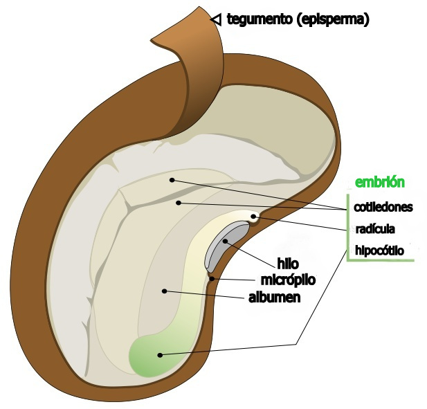 Judia: ejemplo de semilla de dicotiledona